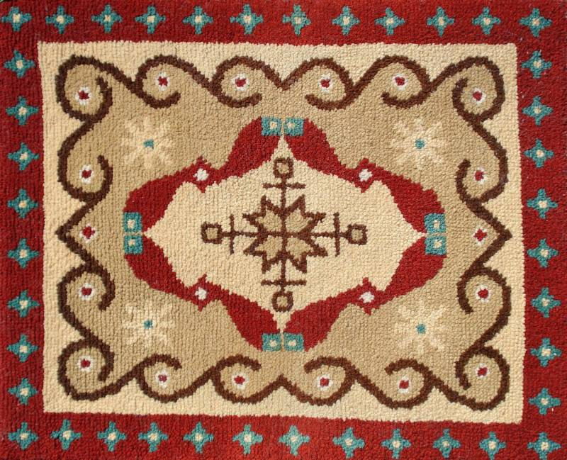 Pommerscher Fischerteppich mit Zweifischen und einem Vieranker